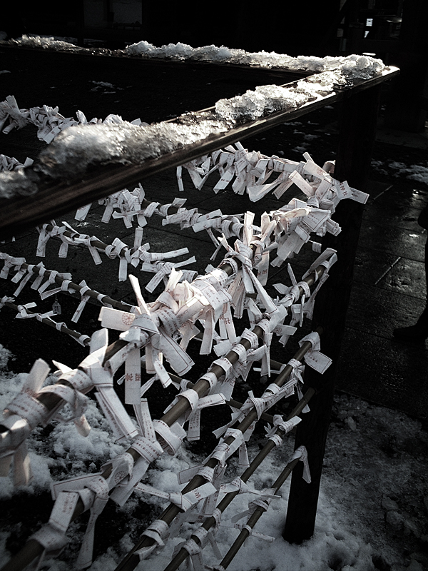 Omikuji at Meiji shrine